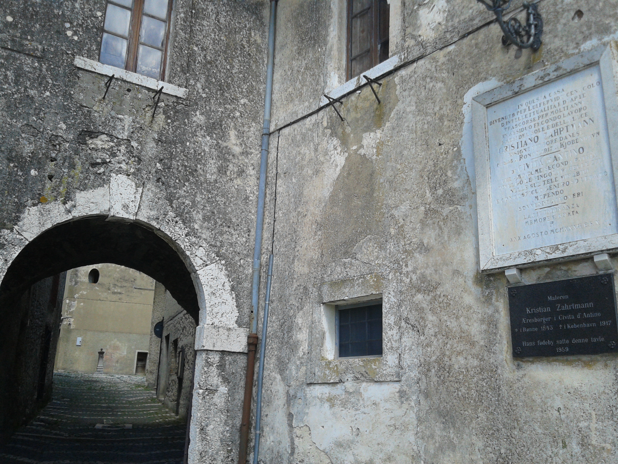 Casa che ospitò Kristian Zahrtmann a Civita d'Antino